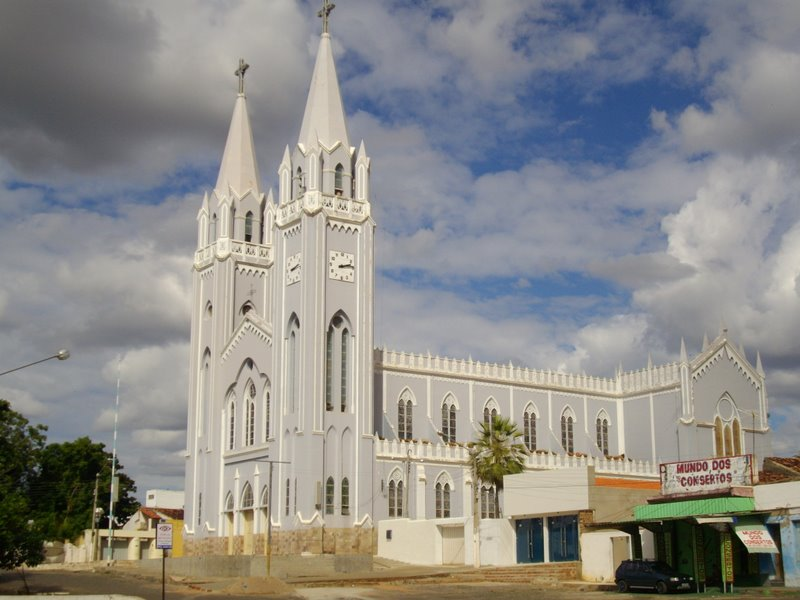 Die Kathedrale Nossa Senhora dos Remédios ("Maria-Hilf") in der brasilianischen Stadt Picos